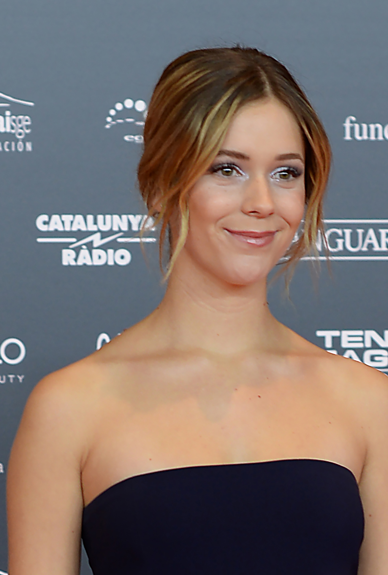 Georgina Amorós, actriu, XII Premis Gaudí (2020)